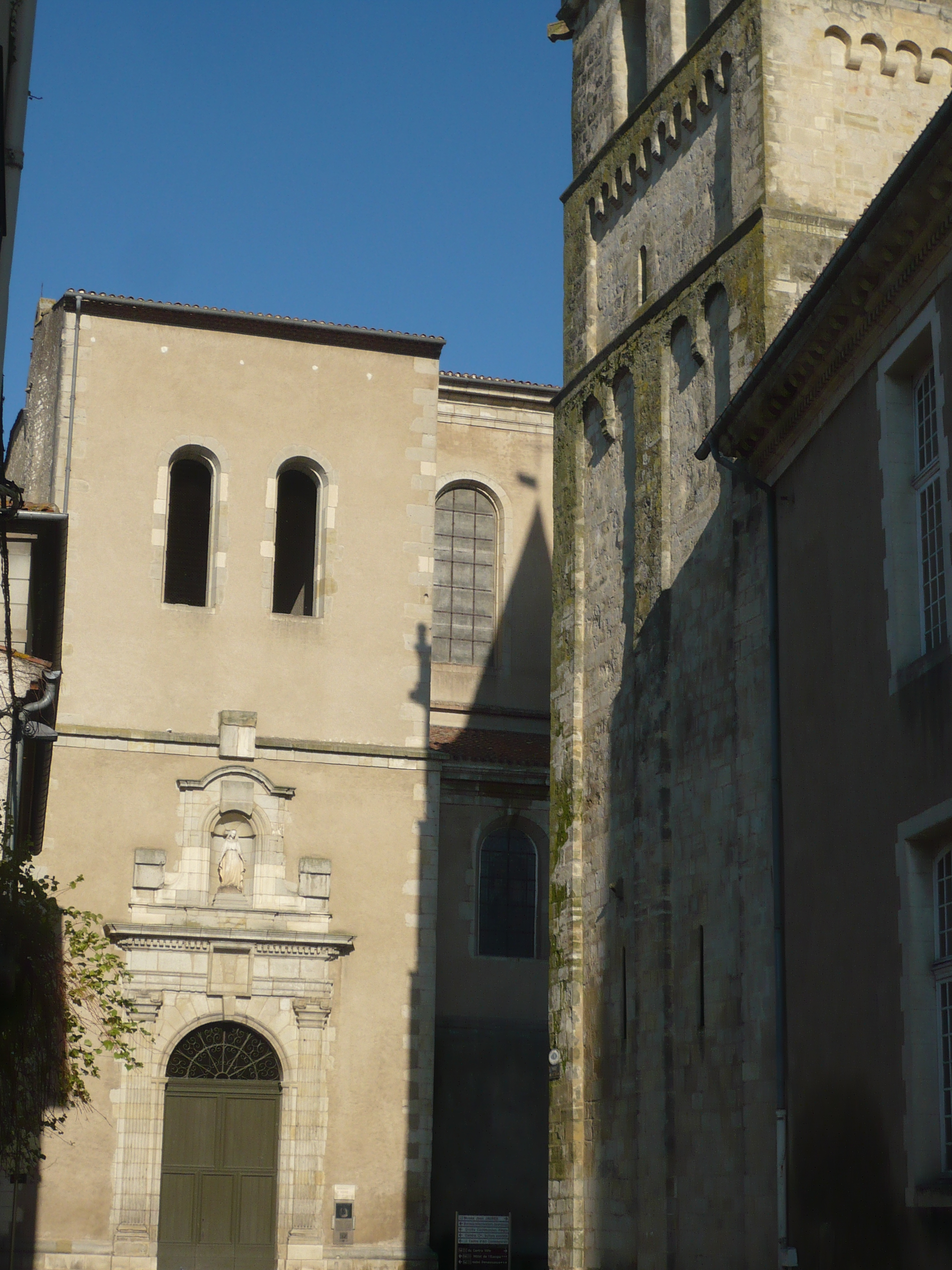 Castres